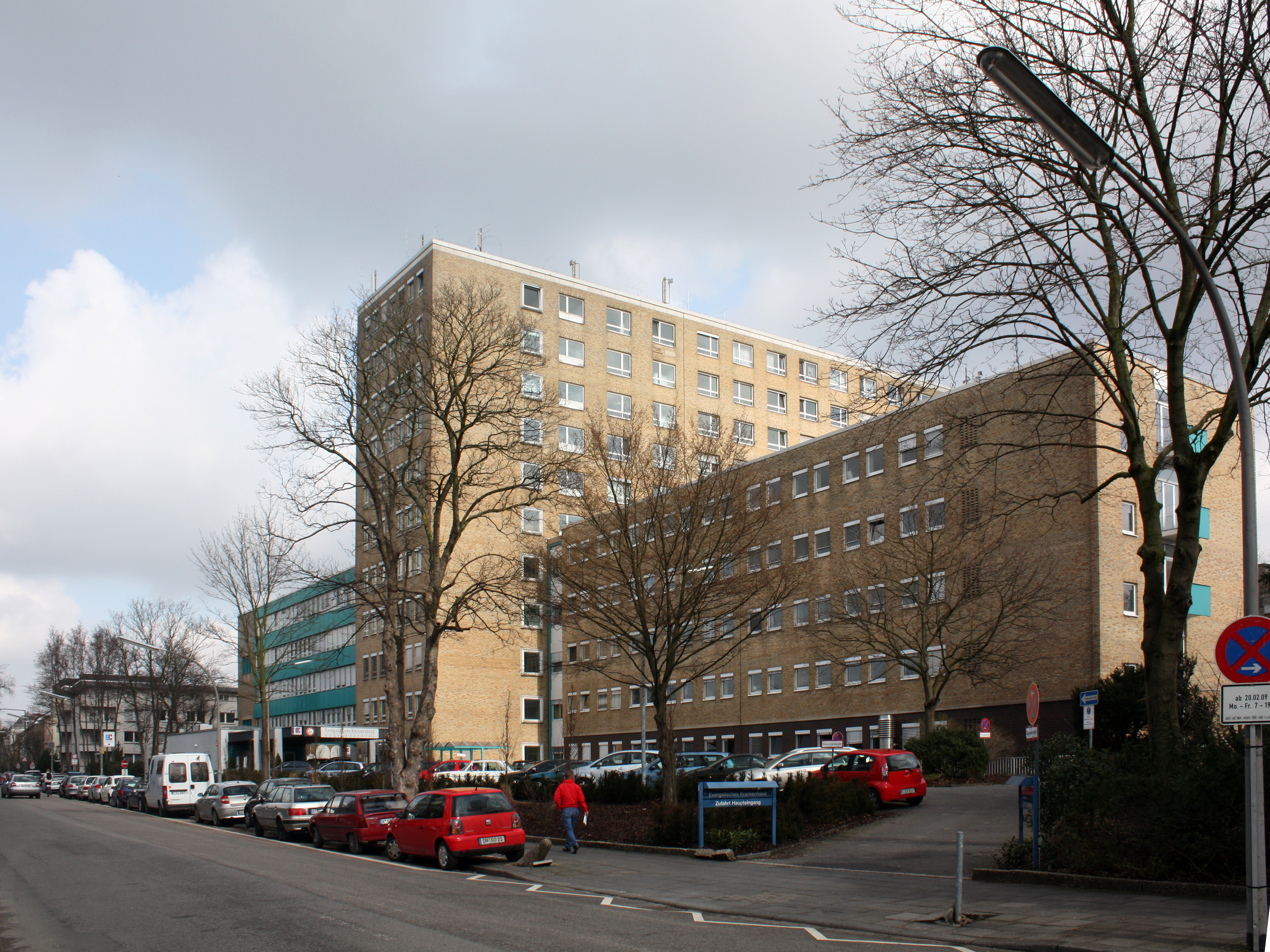 Köln-Lindenthal, Evangelisches Krankenhaus Weyertal